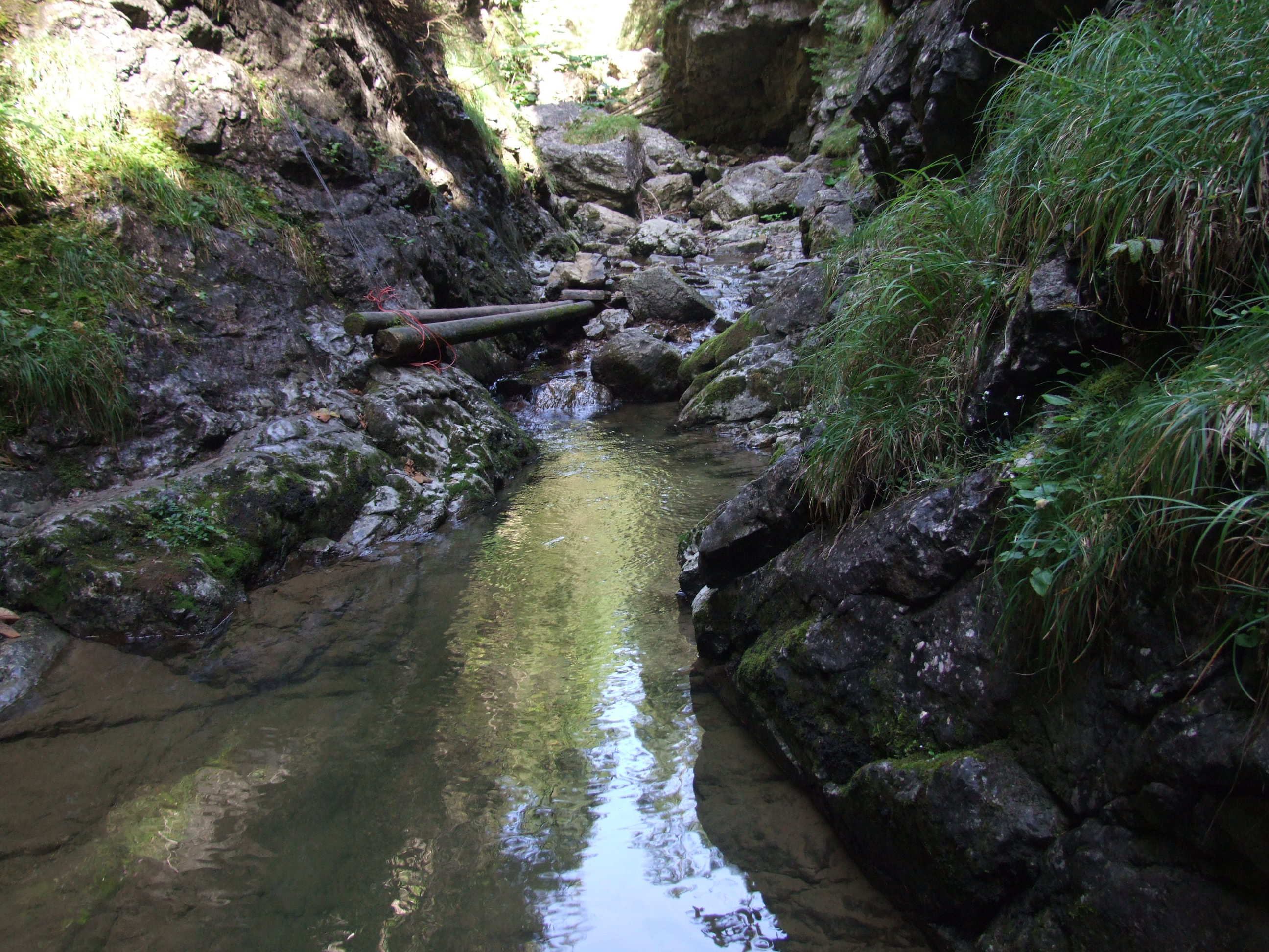 Ráztoka (dopływ Kwaczanki)